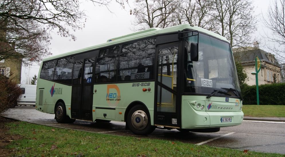 Transport en commun Neufchâteau: Néobus